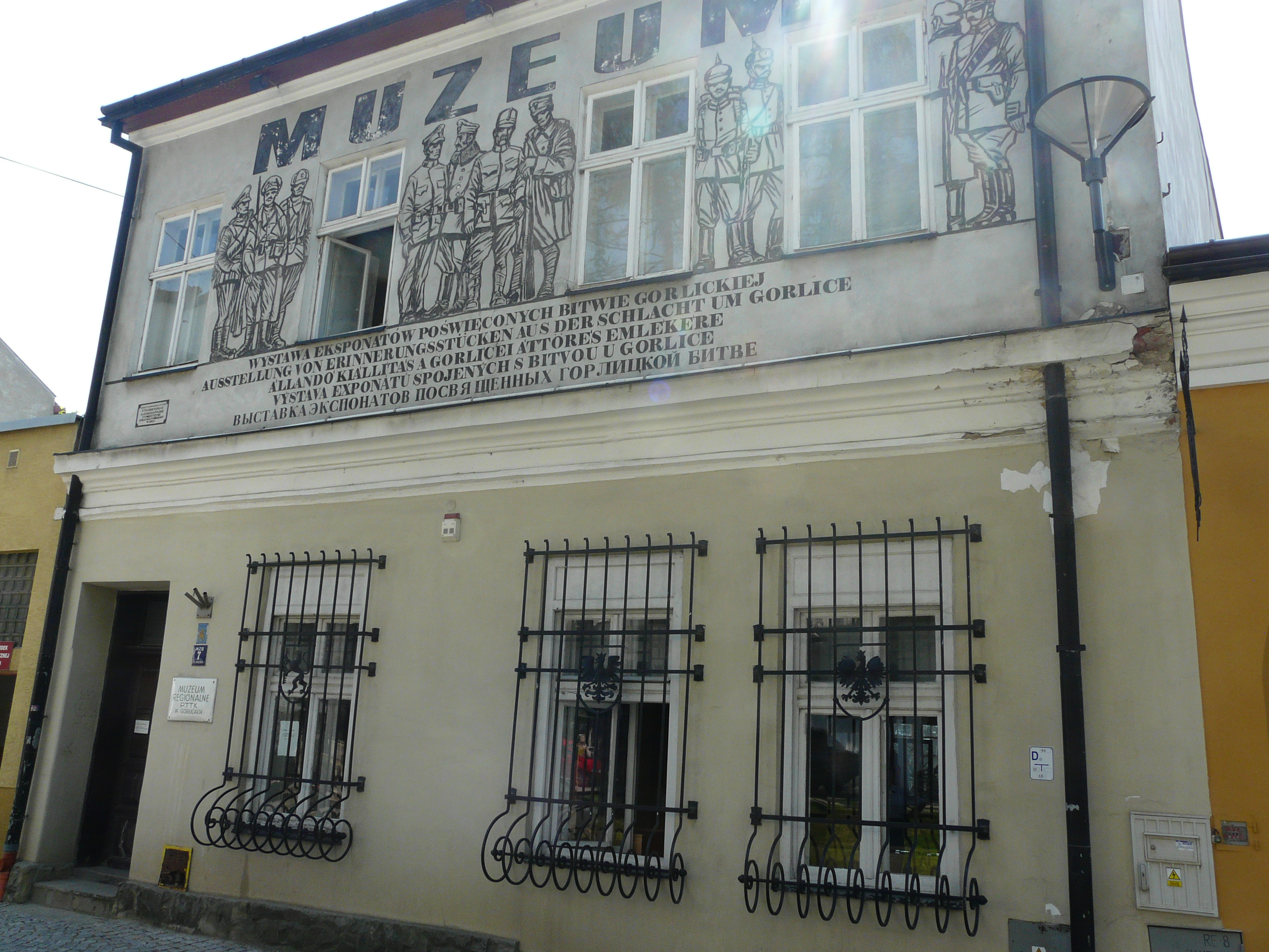 Muzeum Regionalne PTTK im. Ignacego Łukasiewicza